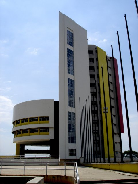 Nuevo Rectorado LUZ